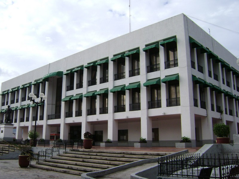 omar91